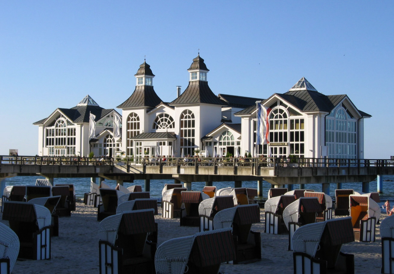 Seebrücke Sellin (Rügen)